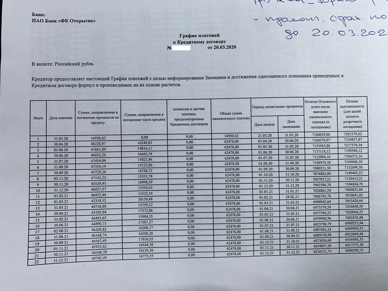 Пример графика платежей в банке Открытие